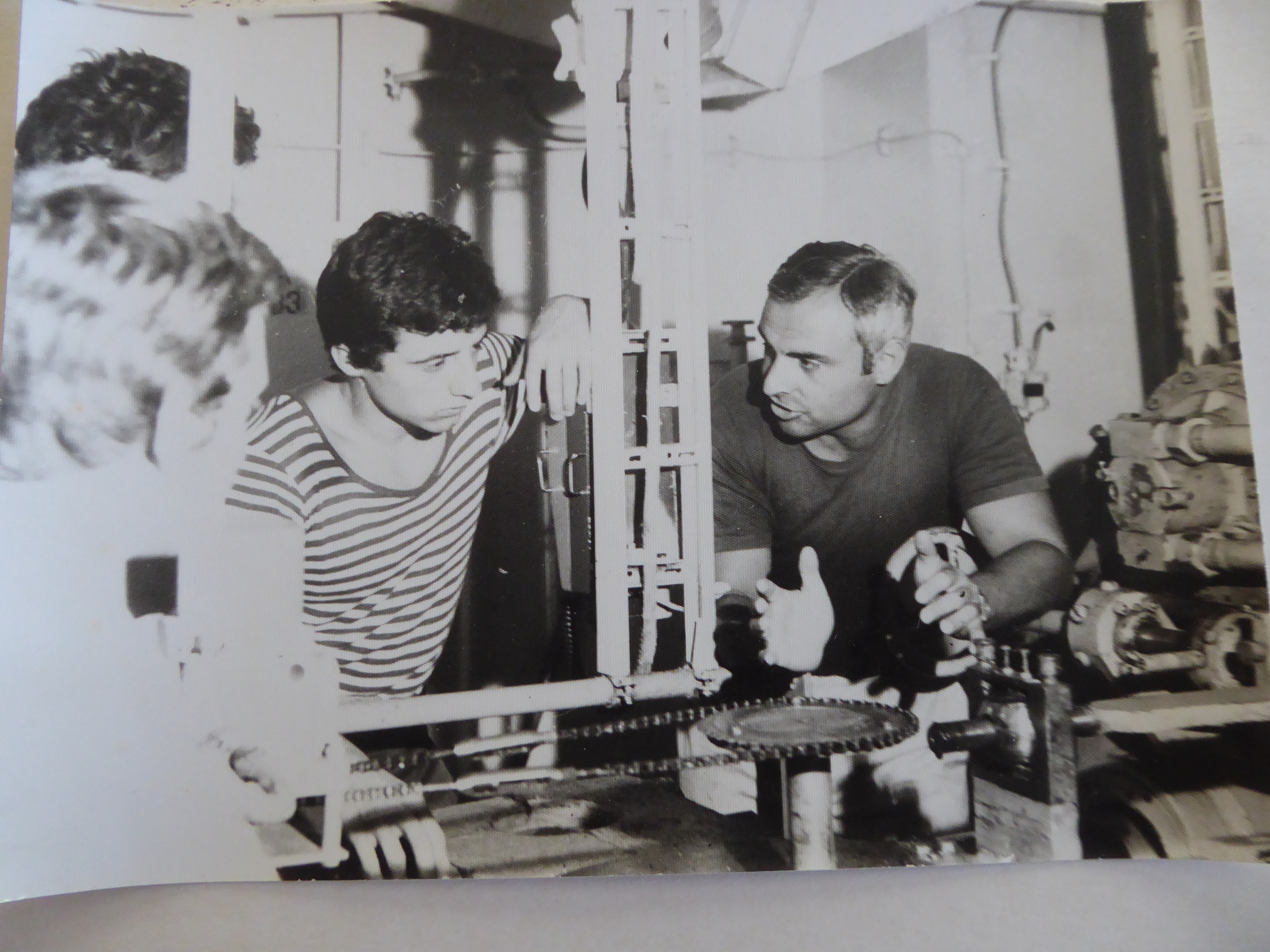 Schulschiff Vaptsarov der Marineakademie Varna-Bulgarien auf Ausbildungsreise, Diplom-Ingenieur A. Totchkov unterrichtet Lehrgangsteilnehmer an der Ruderanlage